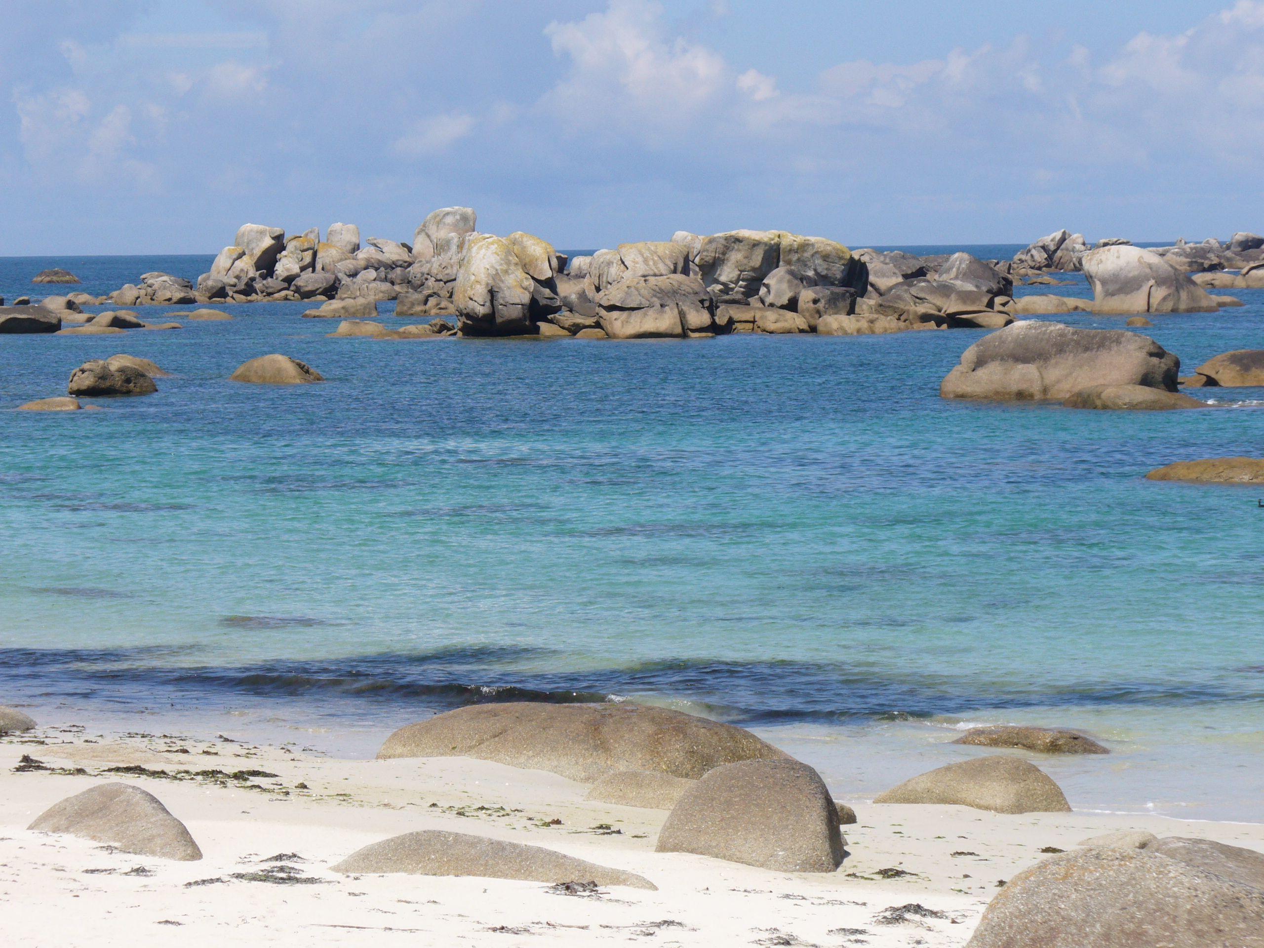 Abers - Côte des Légendes , Küste der Legenden, coast of the legends- Brignogan-Plages, Finistère, Bretagne